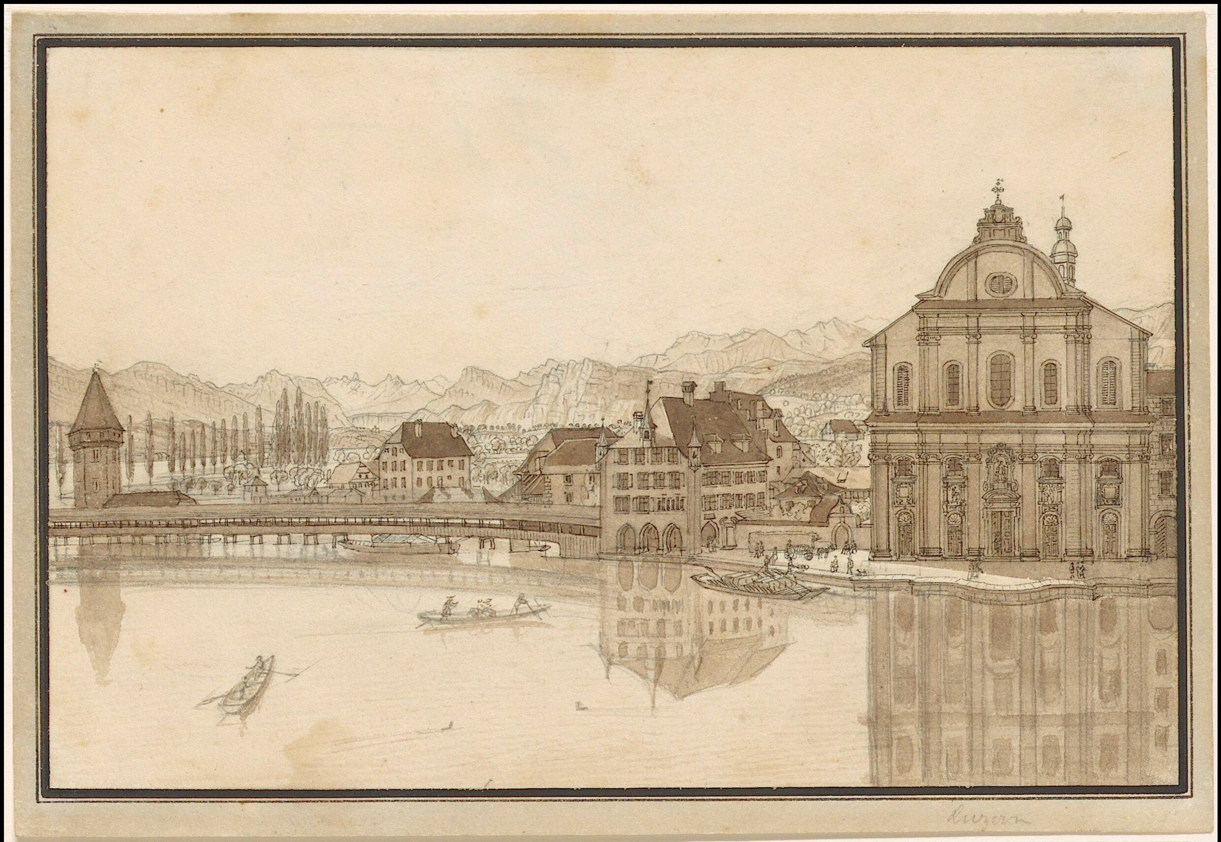 Blick auf linkes Reussufer mit Kapellbrücke, Freienhof und Jesuitenkirche; Zeichnung: Feder, laviert; Bild 12,8 x 19,5 cm, Blatt 14,2 x 20,7 cm